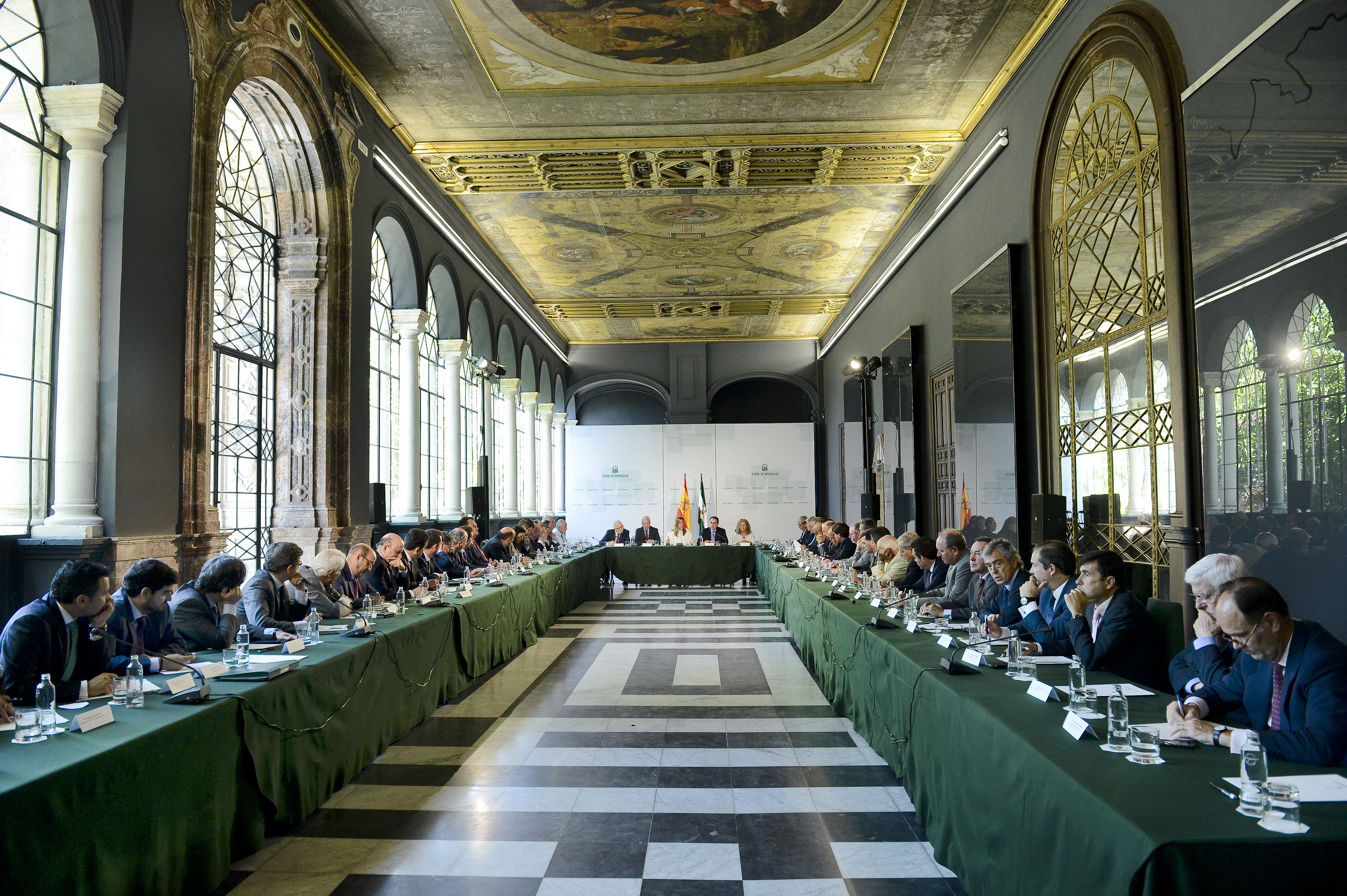 Reunión del Sector Empresarial Andaluz en el Palacio de San Telmo de Sevilla